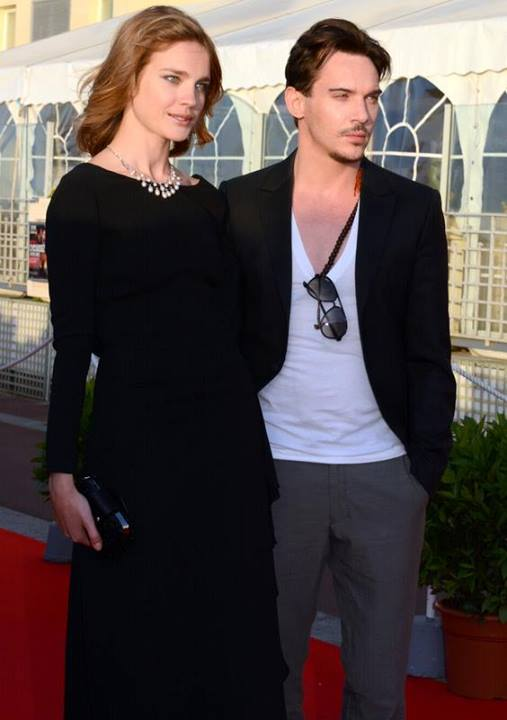 Natalia Vodianova et Jonathan Rhys Meyers lors de la présentation du film "Belle du seigneur" au festival de Cabourg